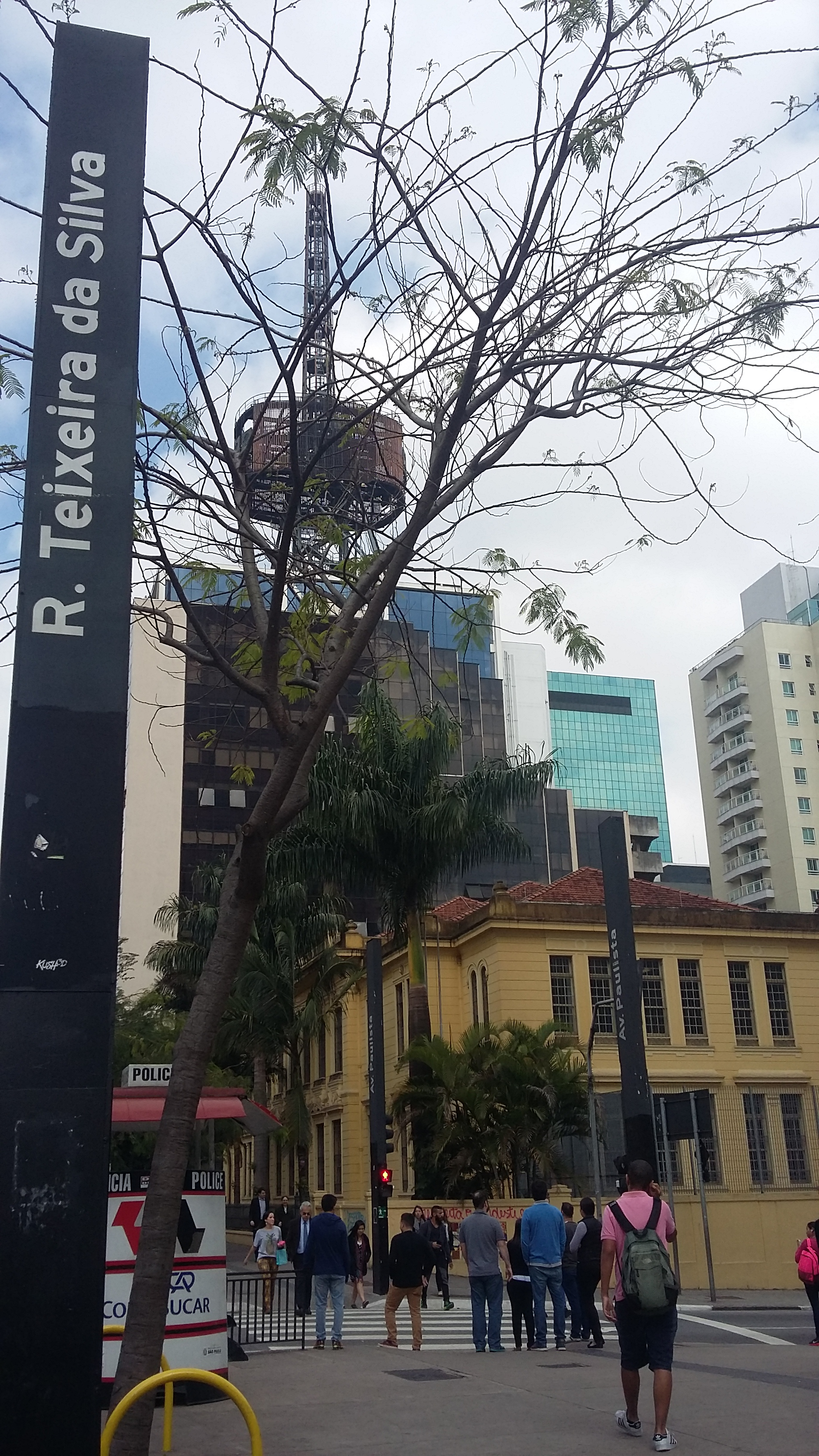 Lateral da Escola Estadual Rodrigues Alves, em São Paulo (SP), Brasil.